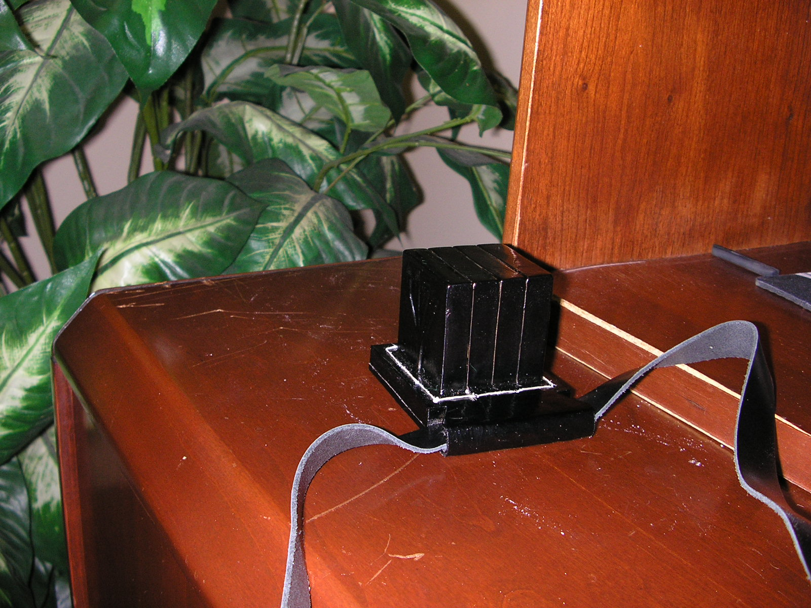 תפילין של ראש של שימושא רבא על פי שיטת ה"משמרת שלום"